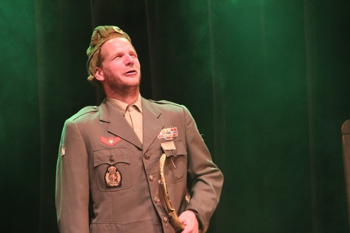 רותם קינן בהופעה